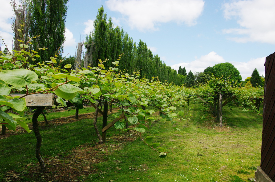 Te Puke, Kiwiplantage, NZL